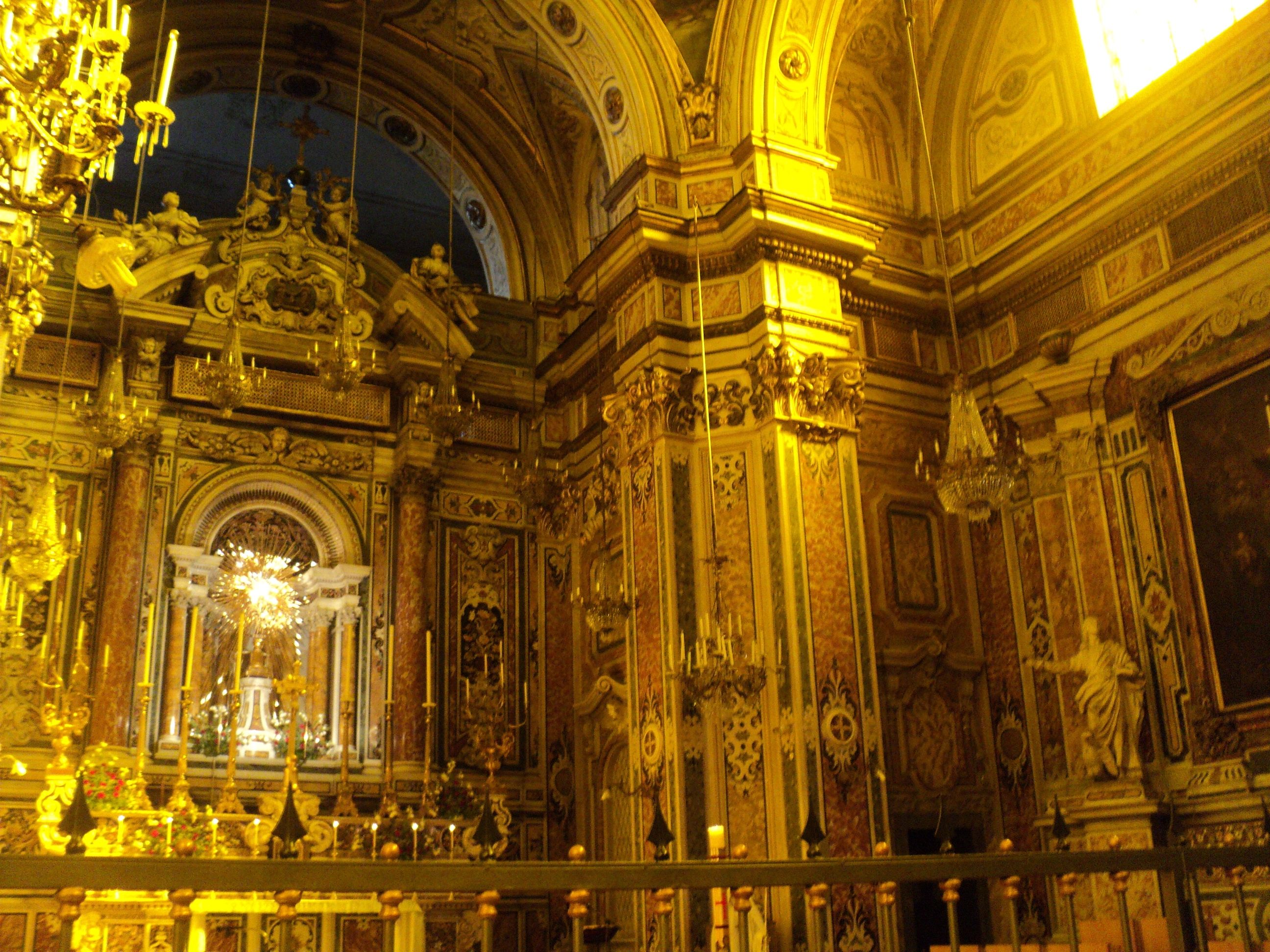 Chiesa di San Giuseppe dei Ruffi (Napoli)